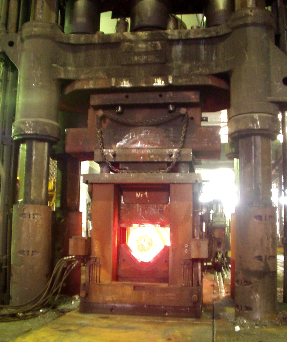 8500-Tonnen Schmiede in der Henrichshütte Hattingen, hier beim Schmieden einer Schiffskurbelwelle. Ende 2003 wurde der Betrieb durch VSG Energie- und Schmiedetechnik eingestellt, die Anlage nach China verkauft, wo sie 2007 wieder in Betrieb ging.